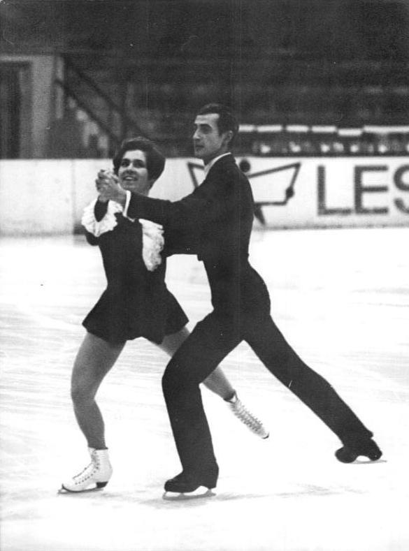 Ludmilla Pachomowa, Alexander Gorschkow Zentralbild Thieme 15.11.69 Karl-Marx-Stadt: Internationales Eiskusntlaufen um den Pokal der blauen Schwerter. Die Vizeweltmeister im Eistanz Ludmilla Pachomowa-Alexander Gorschkow bei ihrem Kürvortrag.